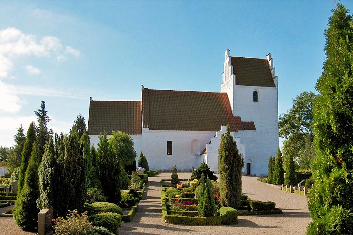 fra nord